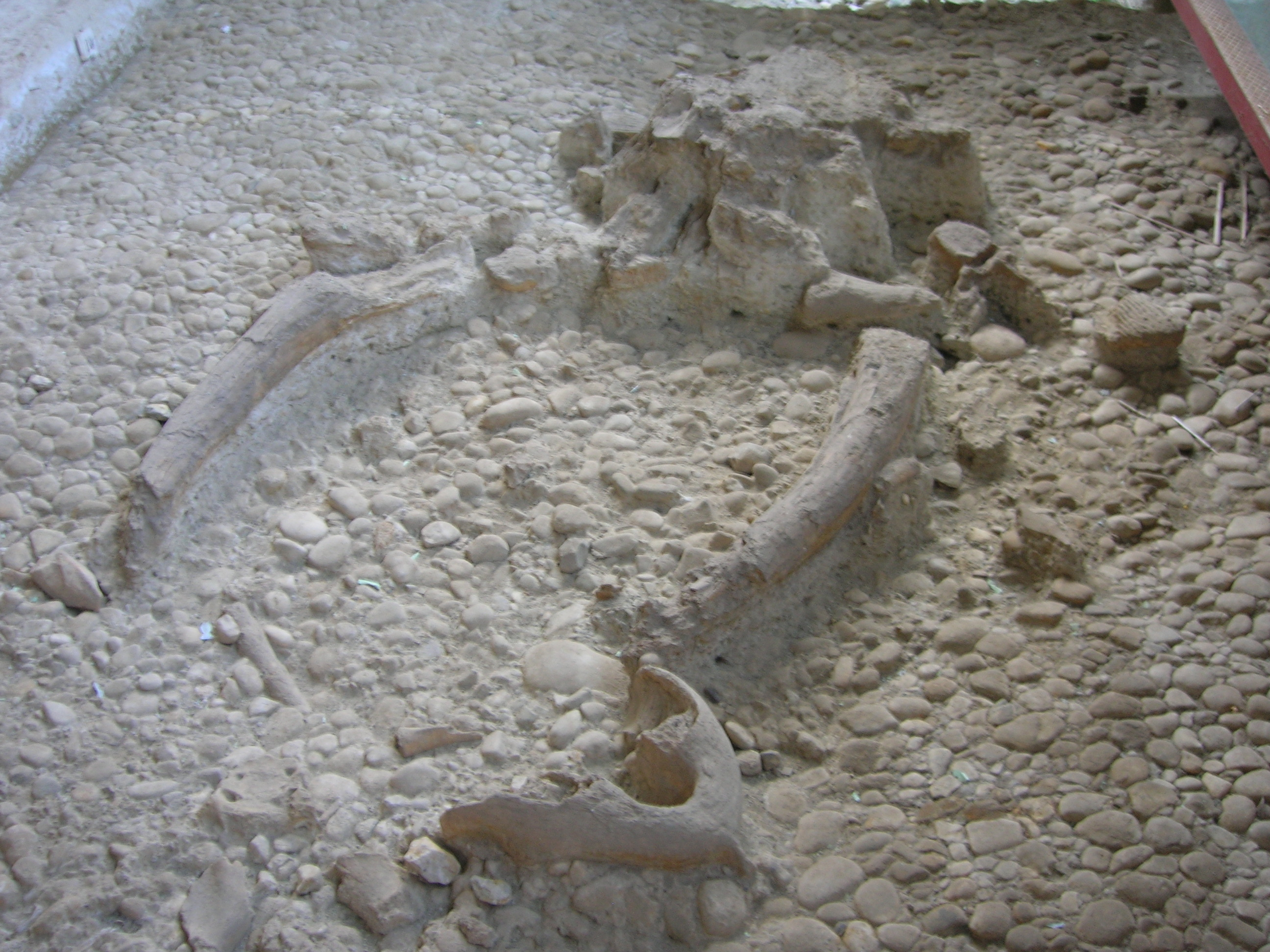 Fossili di un elefante a Notarchirico, Venosa (PZ)